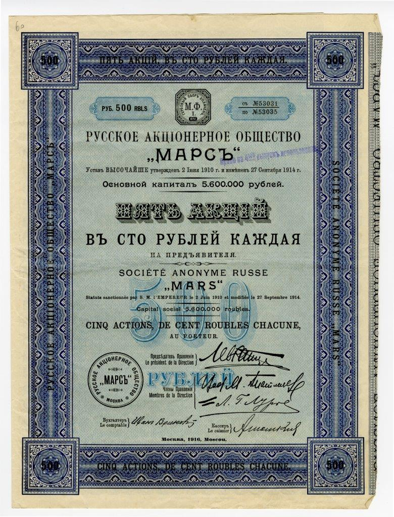 Пять акций на предъявителя в сто руб. каждая Русского акционерного общества "Марс". Москва, 1916 г.